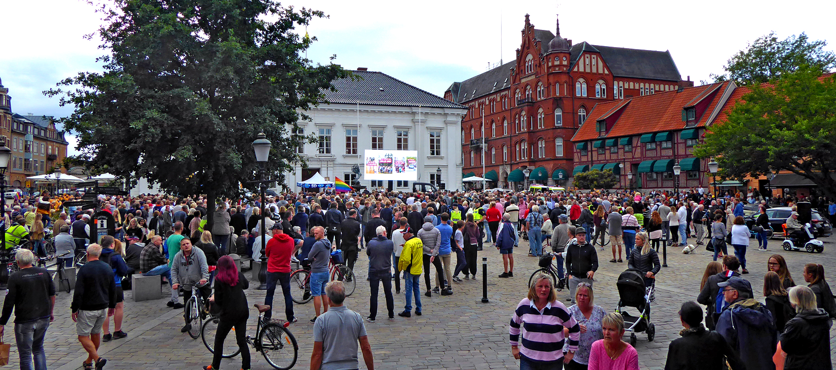 Jimmie Åkesson valtalar på Stortorget i Ystad 31 aug 2018, ca 600 närvarade, ett lugnt och välbesökt möte.